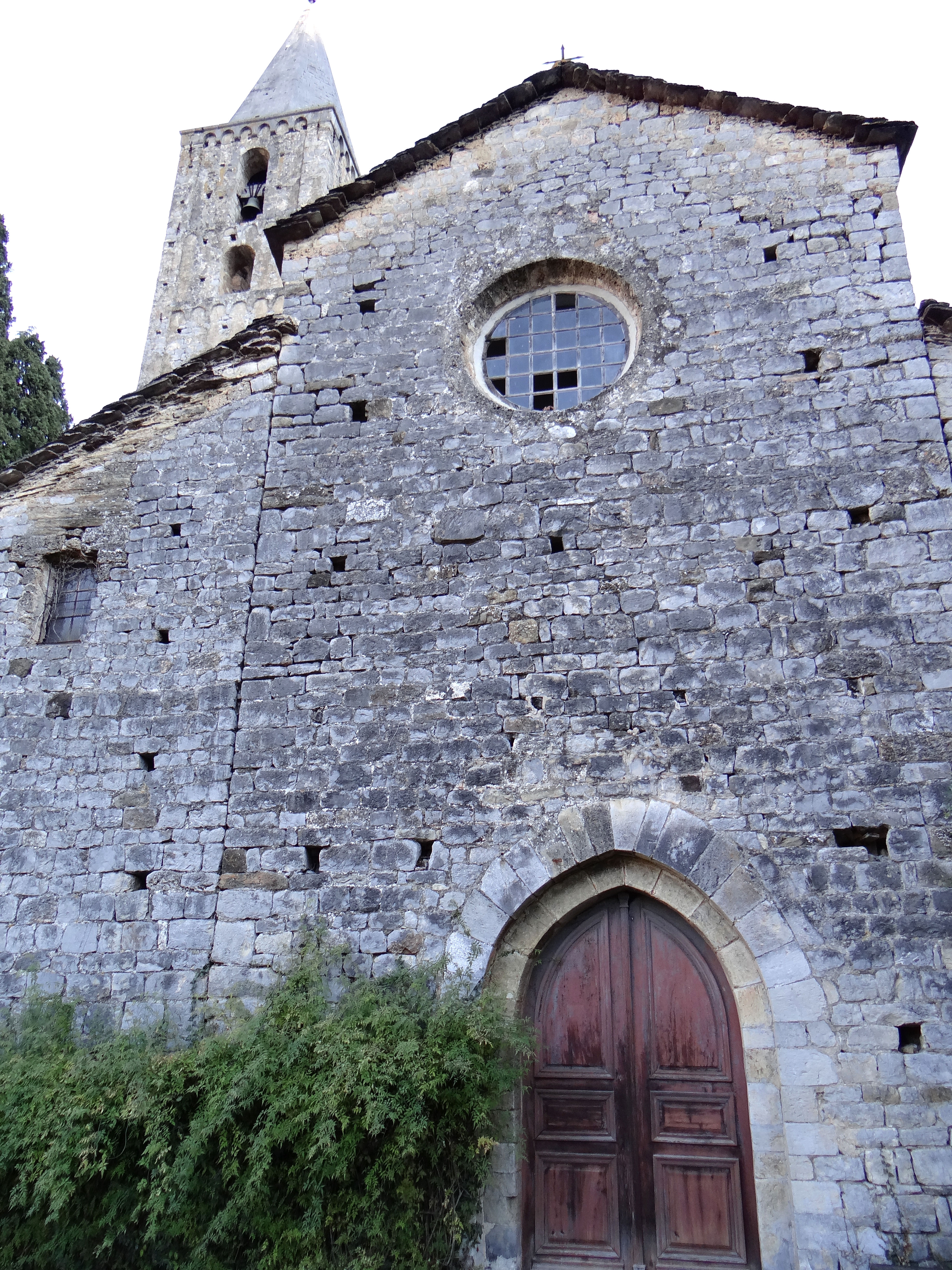 Saorge - Église de la Madone del Poggio - Façade ouest